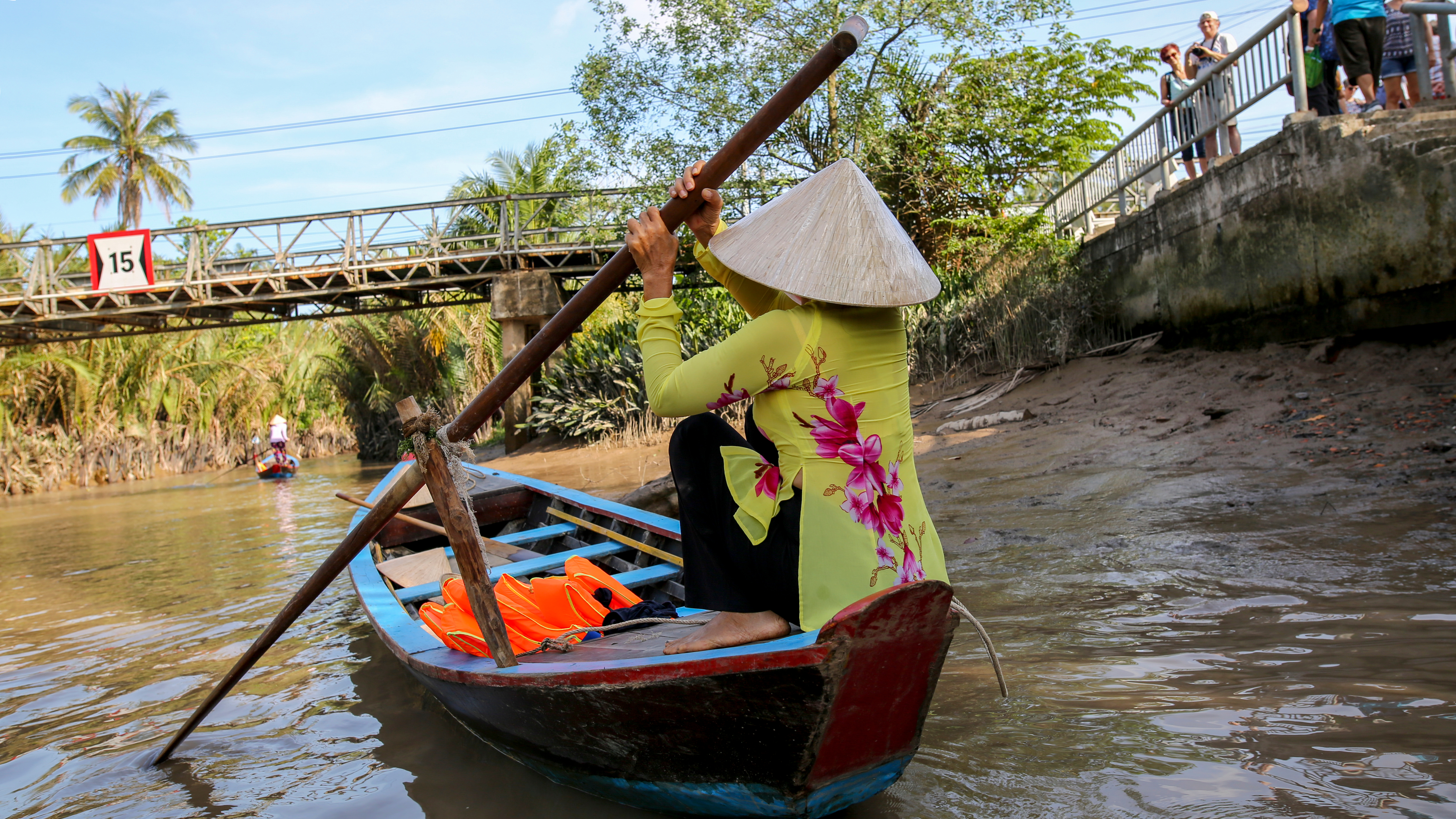 Déplacement en barque sur le Mékong